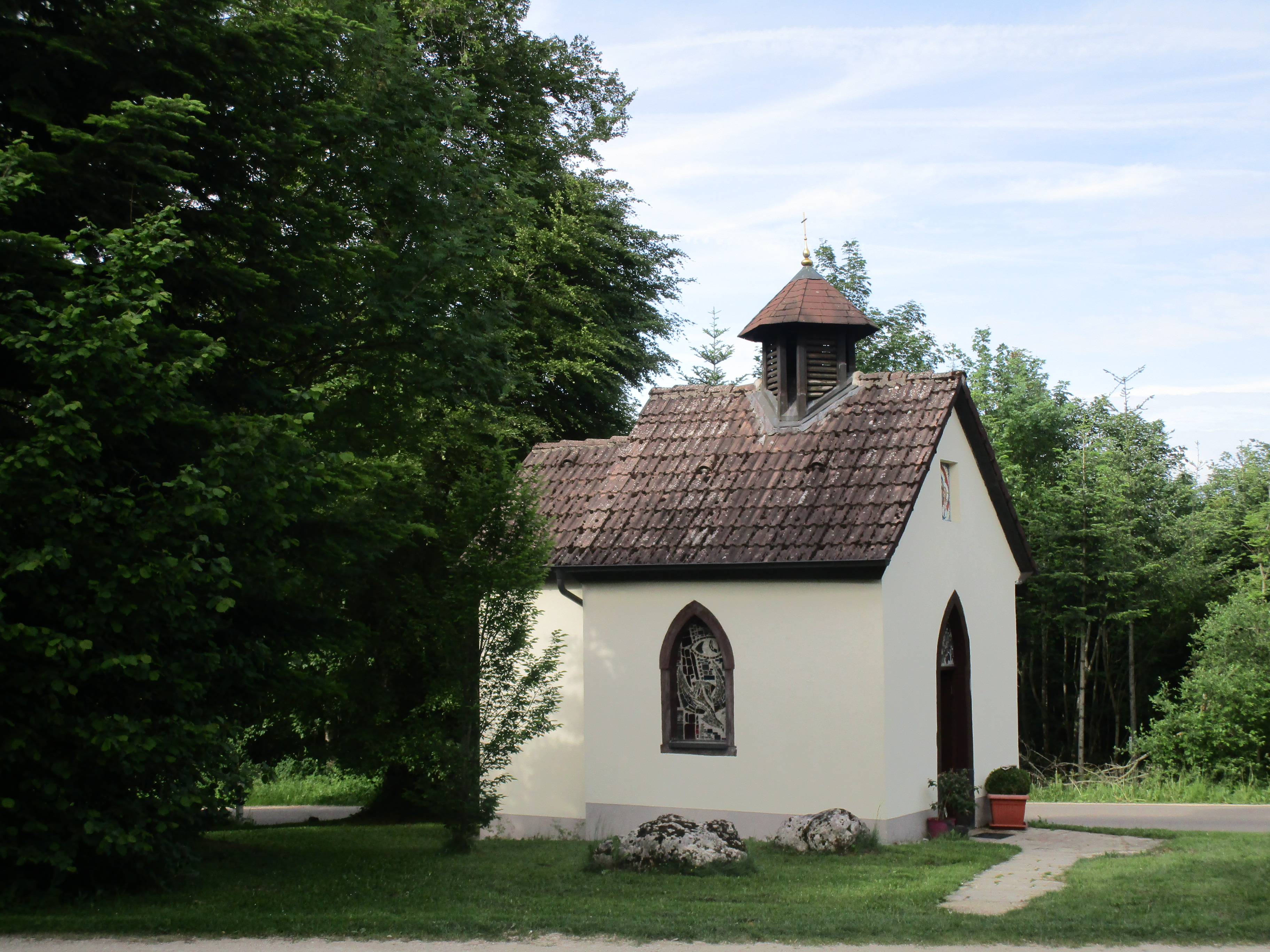 Die Quirinskapelle Gosheim wurde im Jahr 1858 oberhalb von Gosheim in der Schwäbischen Alb in einer Höhe von 987 Metern an der heutigen Kreisstraße 5905 von Gosheim nach Böttingen errichtet. An der Kapelle führt der Schwäbische-Alb-Nordrand-Weg vorbei.